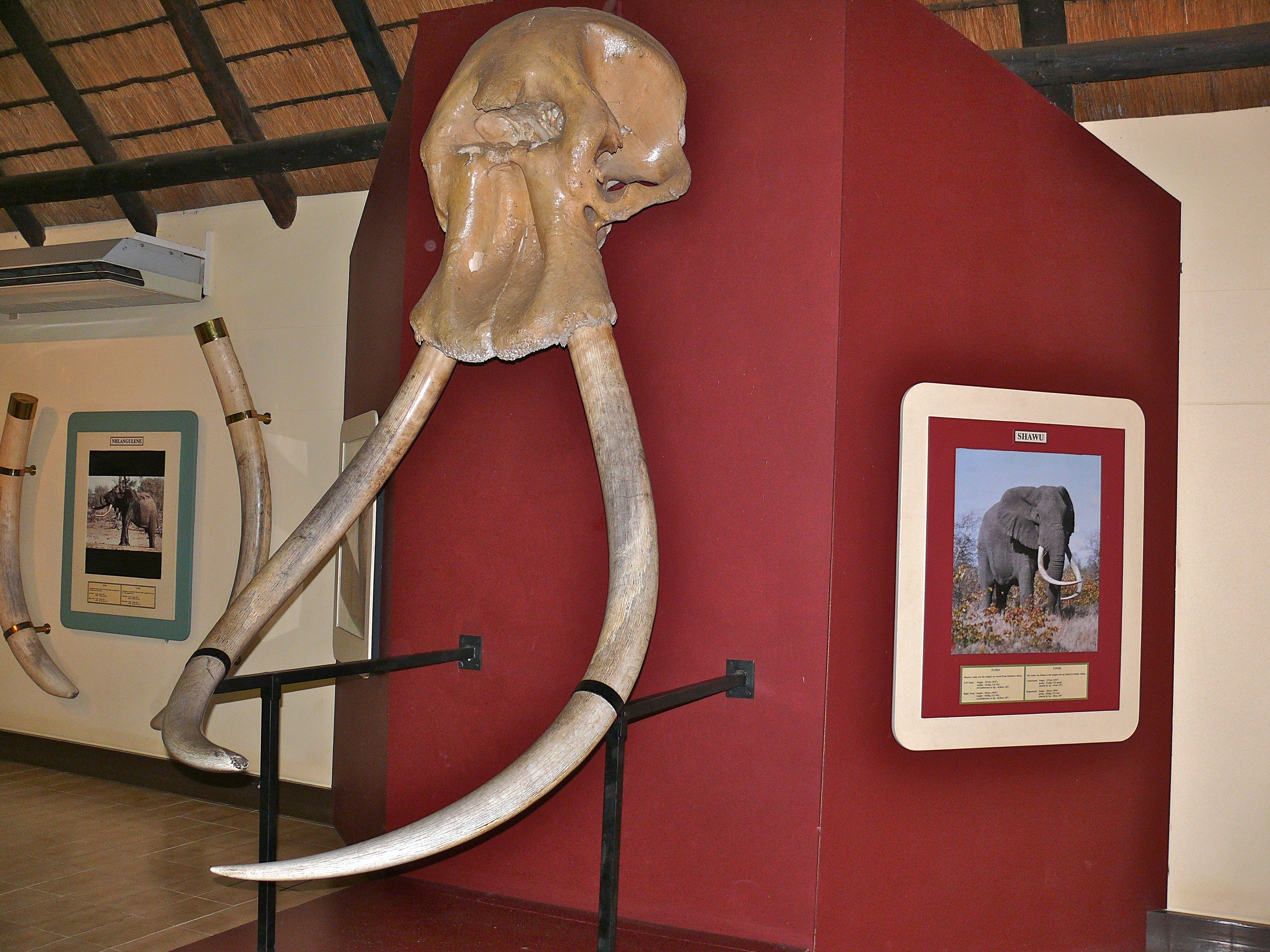 Letaba Camp, Kruger NP, SOUTH AFRICA